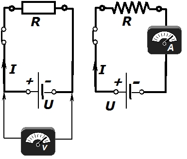 Mesaurement U and I